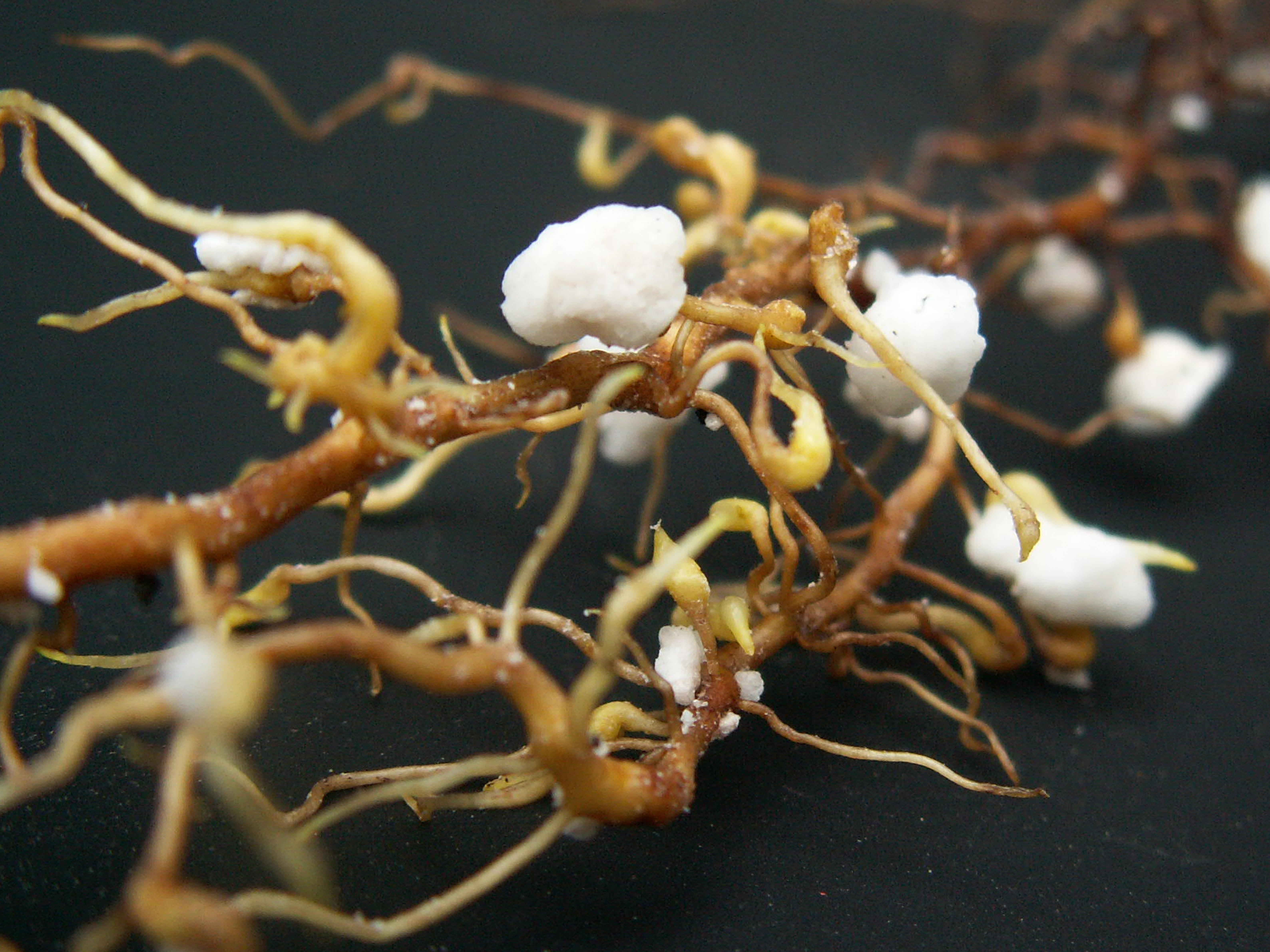 Von der Wurzelreblaus verursachte Nodositäten auf Rebwurzeln